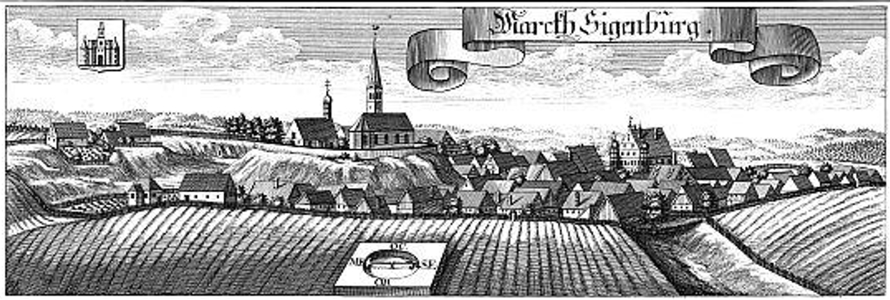 Markt Siegenburg: Kupferstich von Michael Wening um 1700